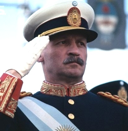 Es una foto del presidente de facto Juan Carlos Ongania, en el momento que toma el poder.